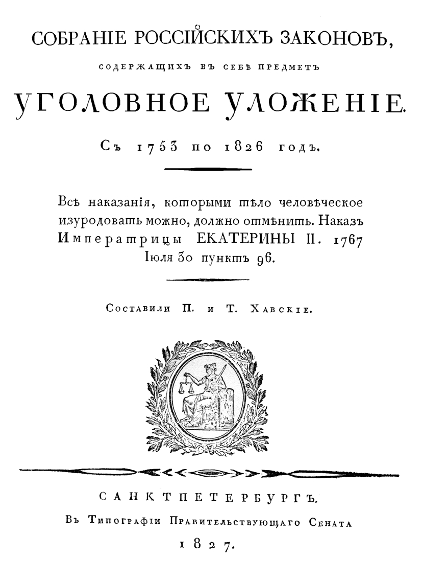 Собрание российских законов, содержащих в себе предмет Уголовное Уложение. С 1753 по 1826 год